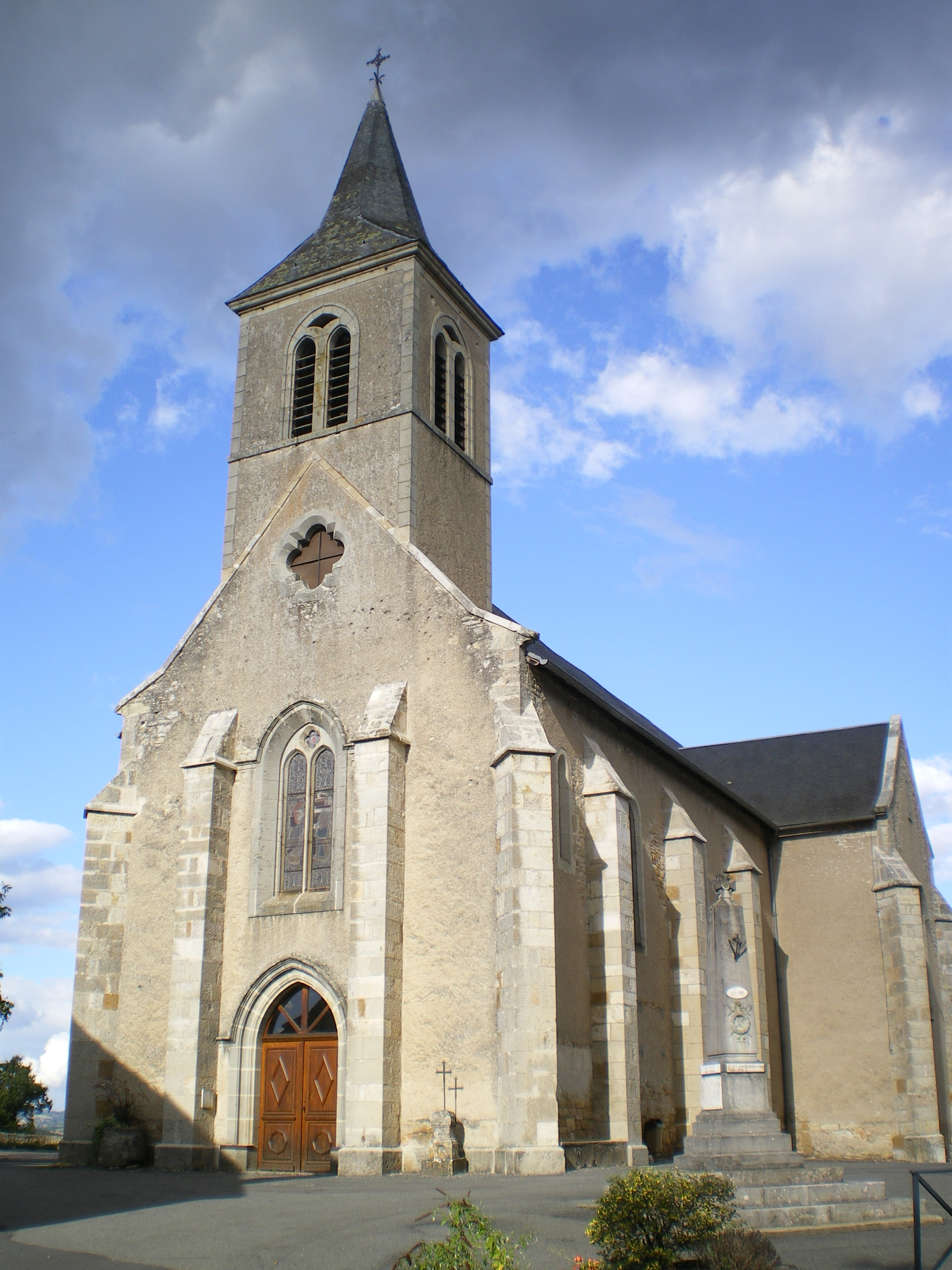 Église de Béduer